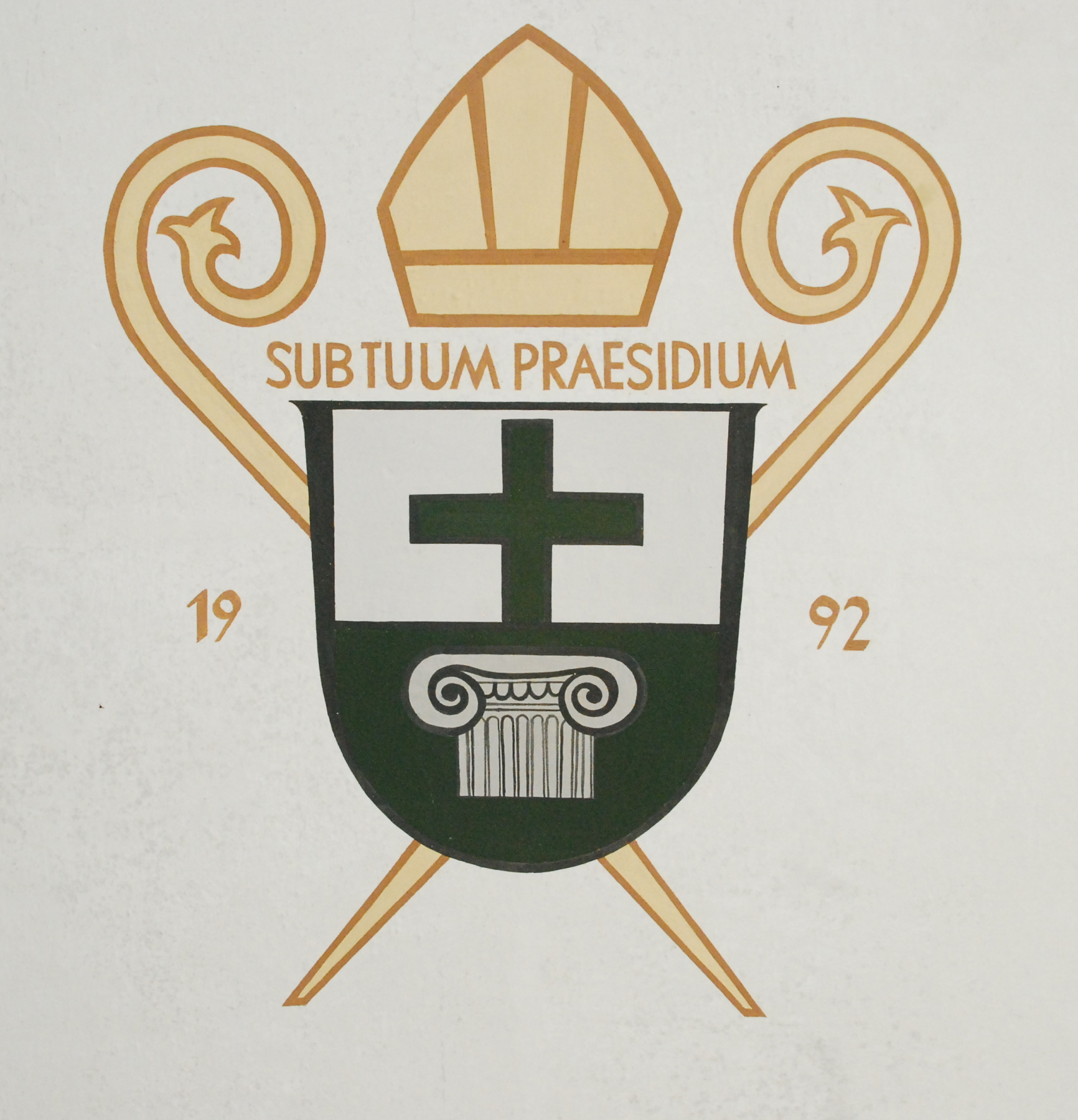 Pfarrkirche von Wildalpen in der Steiermark; Wappen von Abt Benedikt Schlömicher, Admont